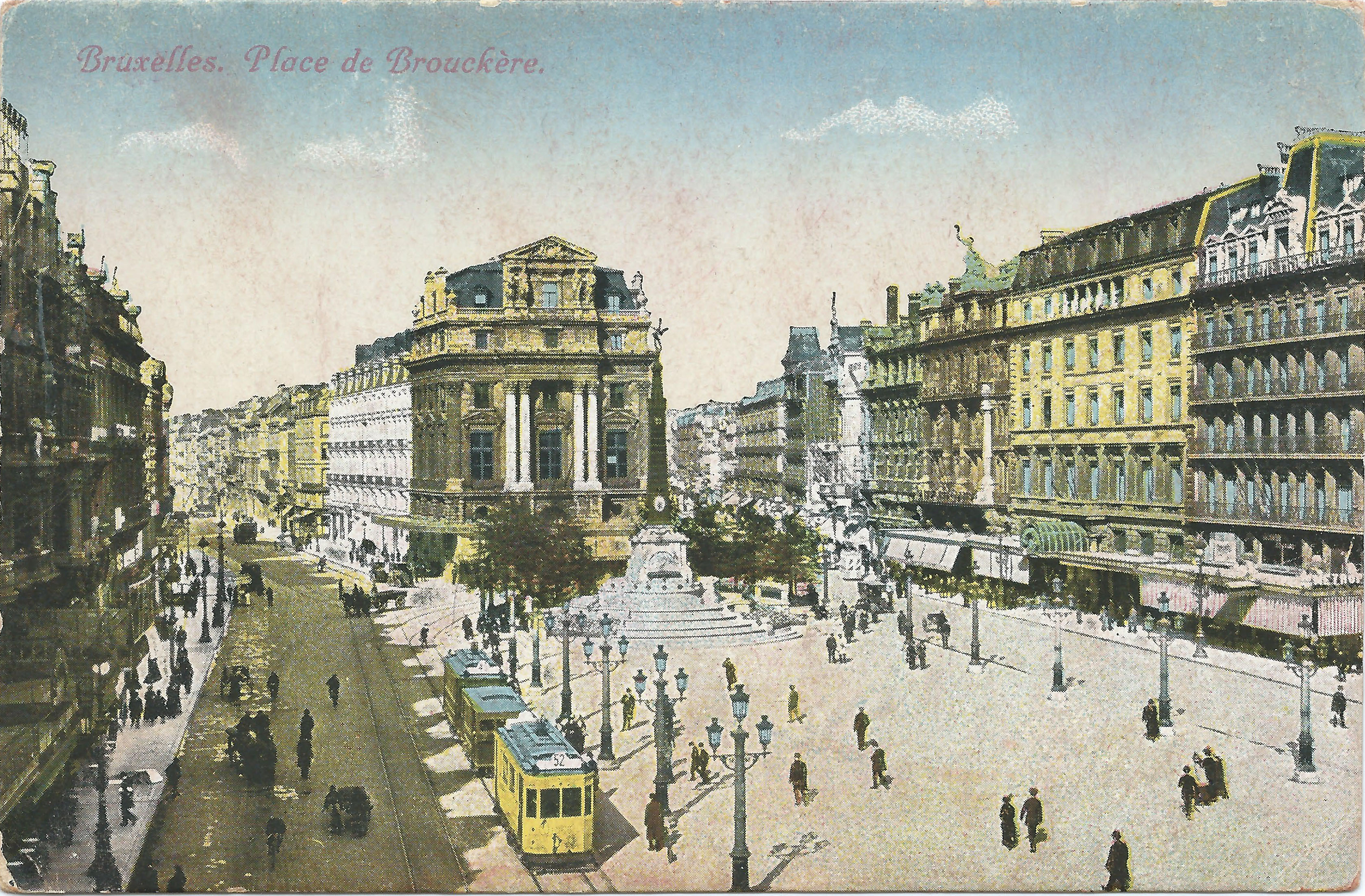 Briefkaart van de Brouckèreplein